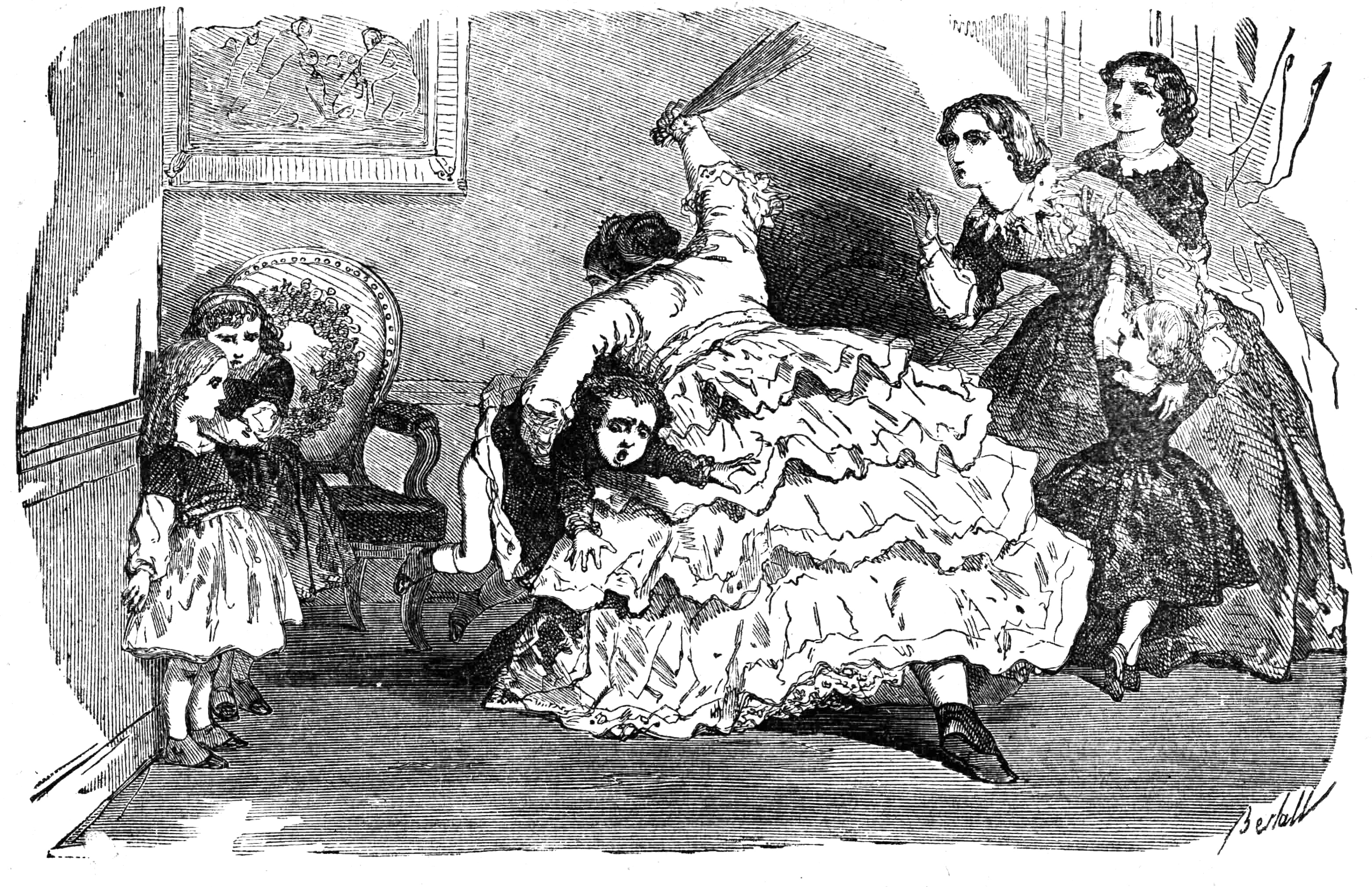 « Et, avant que personne ait eu le temps de s’y opposer, elle tira de dessous son châle une forte verge, s’élança sur Sophie et la fouetta à coups redoublés, malgré les cris de la pauvre petite, les pleurs et les supplications de Camille et de Madeleine, et les remontrances de Mme de Fleurville et d’Élisa, indignées de tant de sévérité. » (Page 67.) Illustration contenue dans le roman de (wikipedia-FR) Sophie Rostopchine, comtesse de Ségur, Les Petites Filles modèles, (wikisource-FR) Chapitre VIII : Les hérissons.